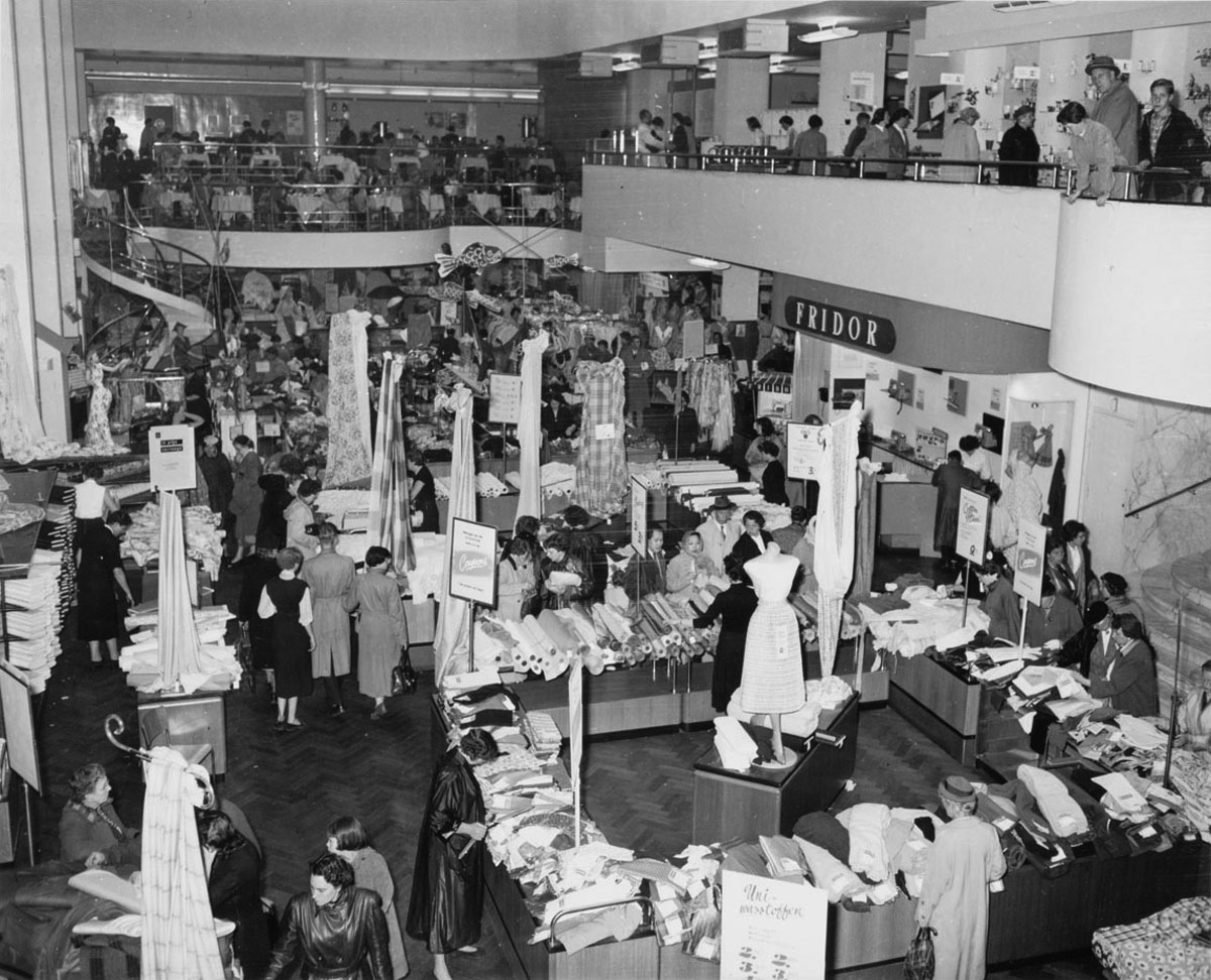 Stoffenafdeling van De Bijenkorf, Amsterdam, juli 1955 Foto Ben van Meerendonk / AHF, collectie IISG, Amsterdam